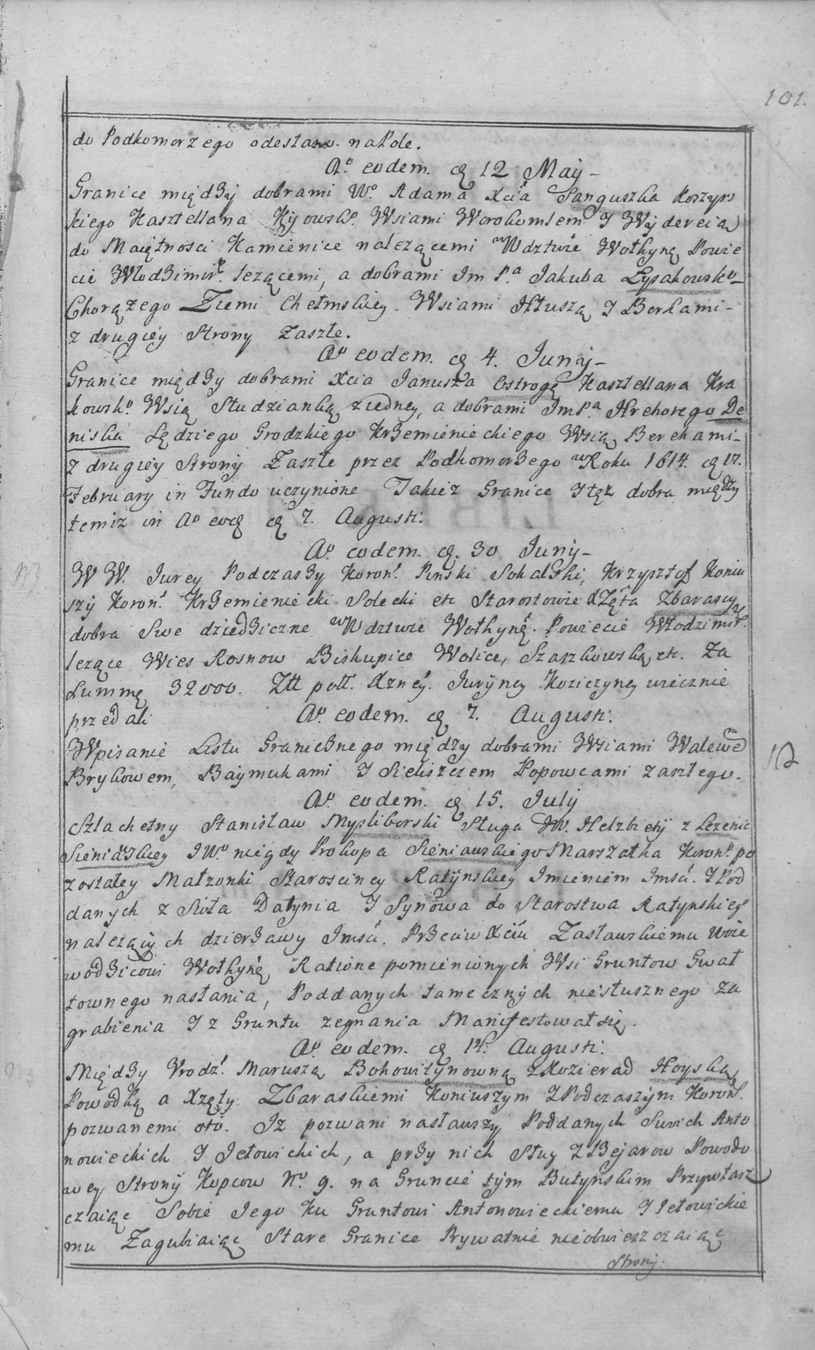 Выпись из Книги воеводства Волынского от 30 июня 1620 года о продаже Роснова, Бискупичей, Волицы и Жаскович Владимирского повета. Рукопись из фондов ЛНБ им. В. Стефаника.